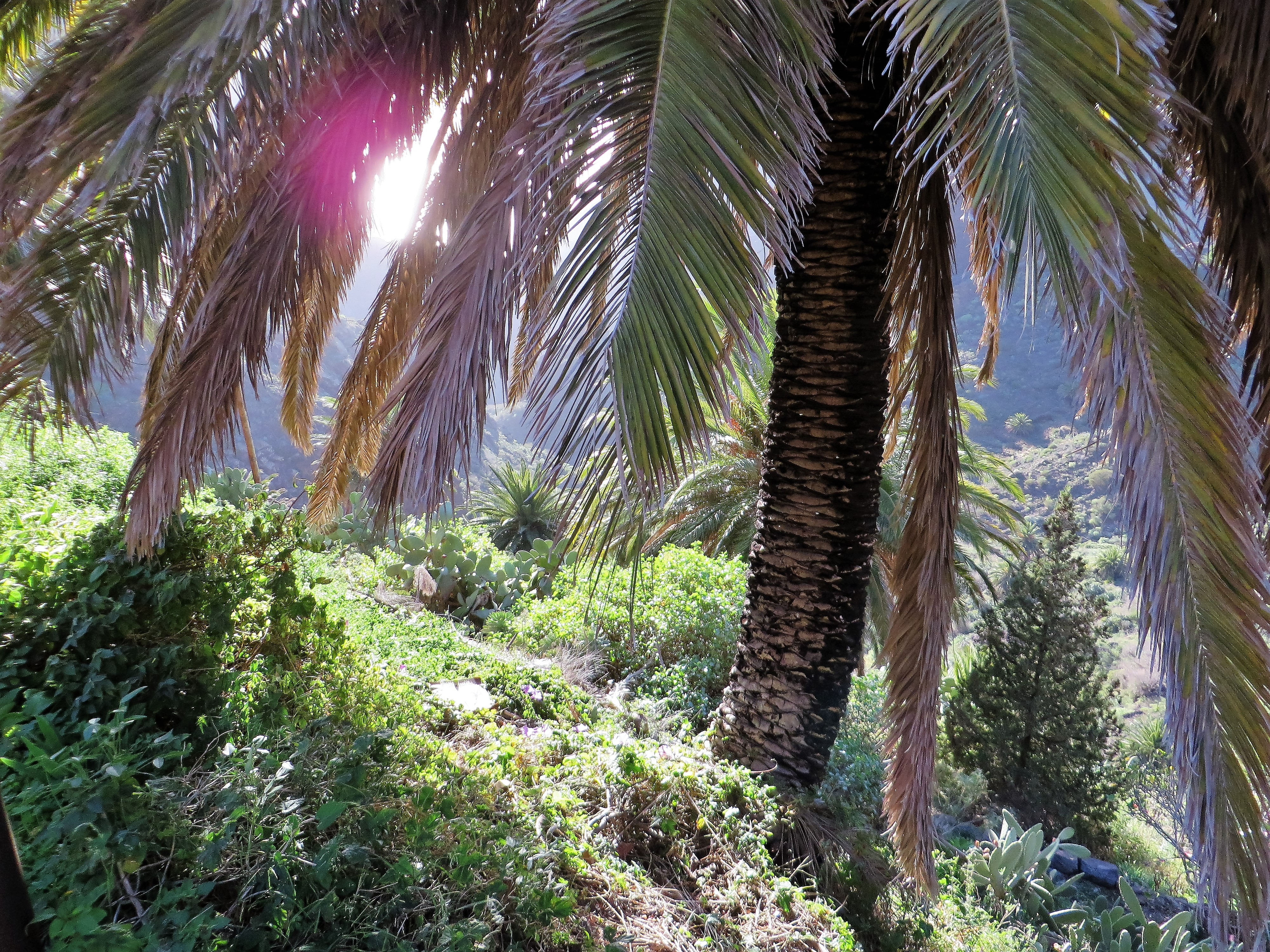 Flora von Masca oberhalb der Schlucht vor Sonnenuntergang